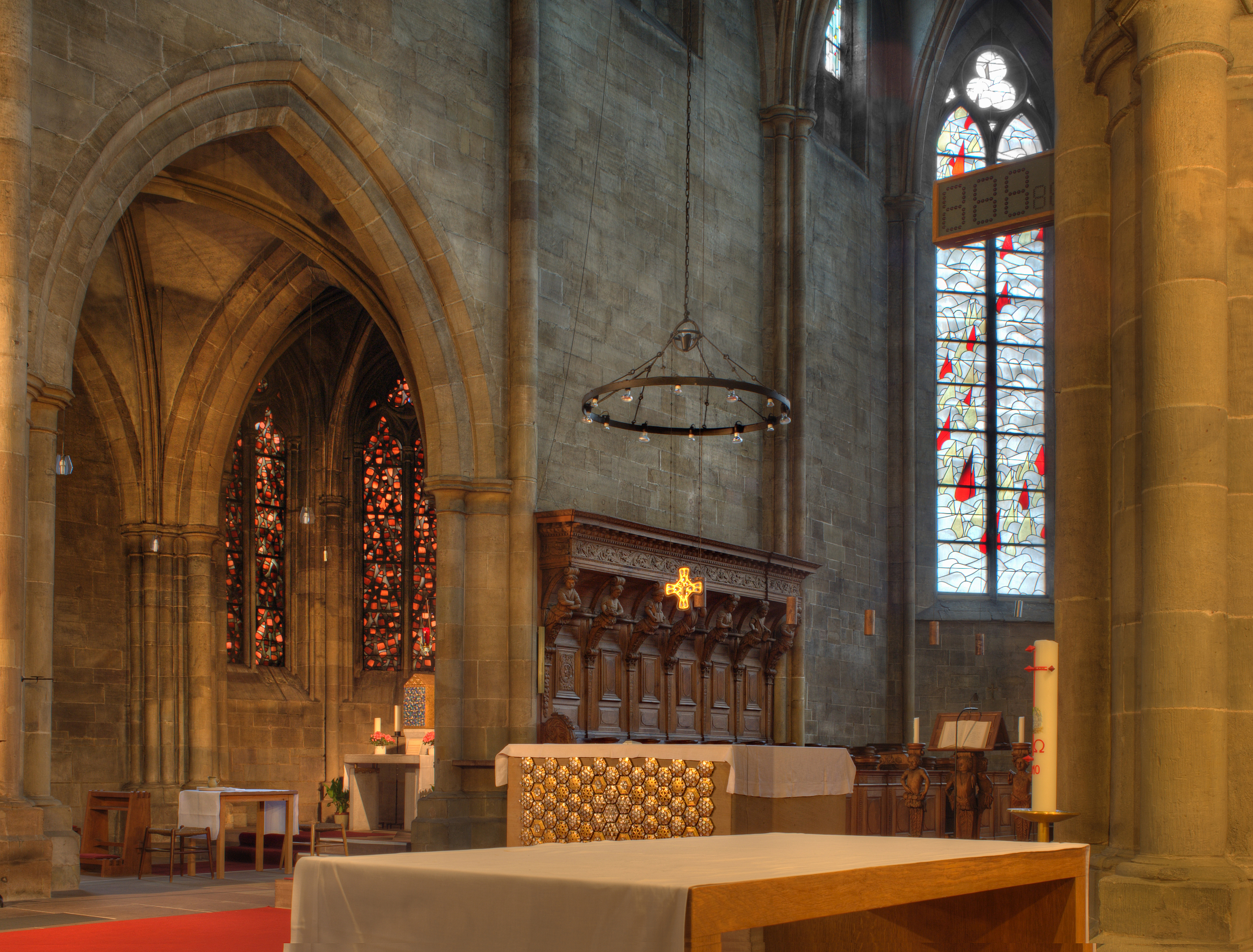 Altarraum